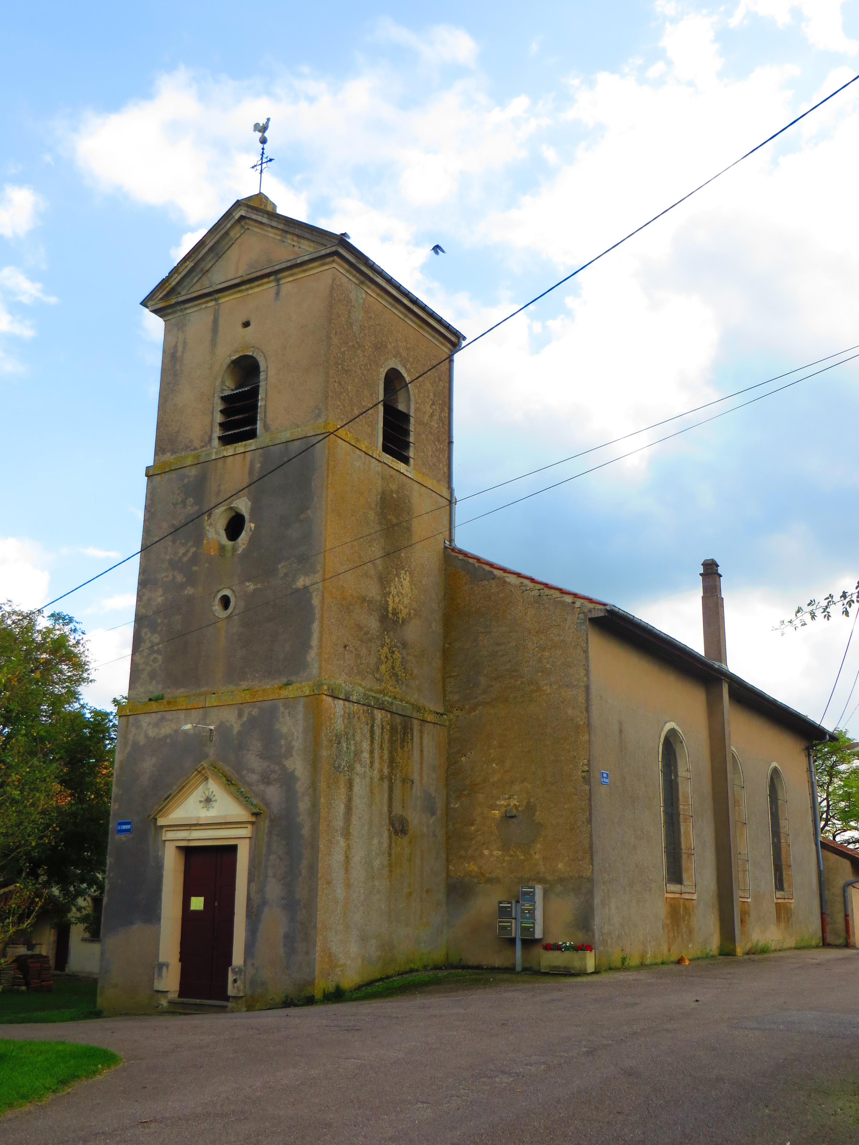 Viviers Église de l'Assomption-de-la-Bienheureuse-Vierge-Marie